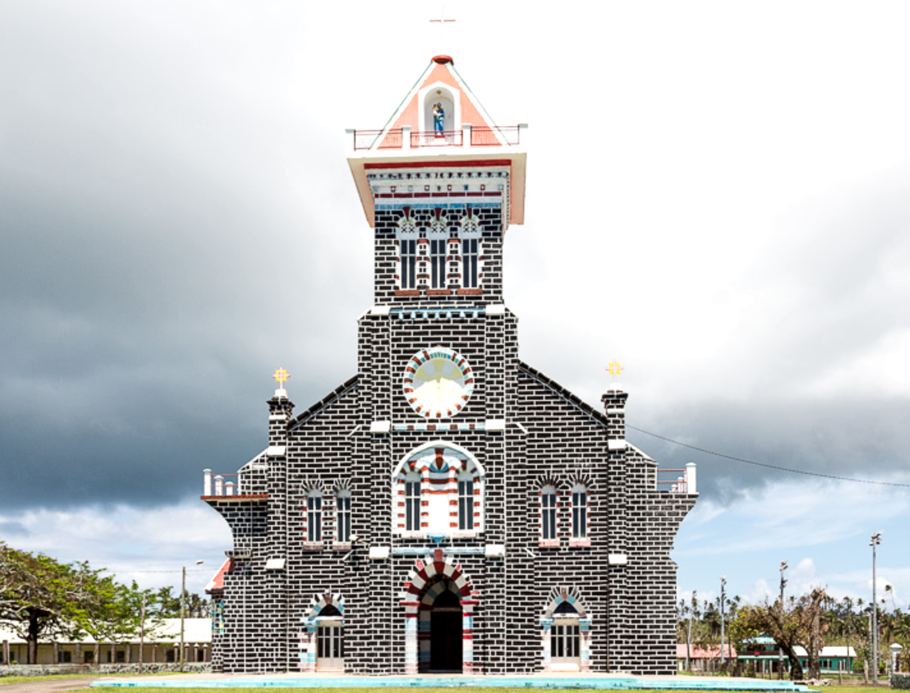 Kirche in Male'efo'ou